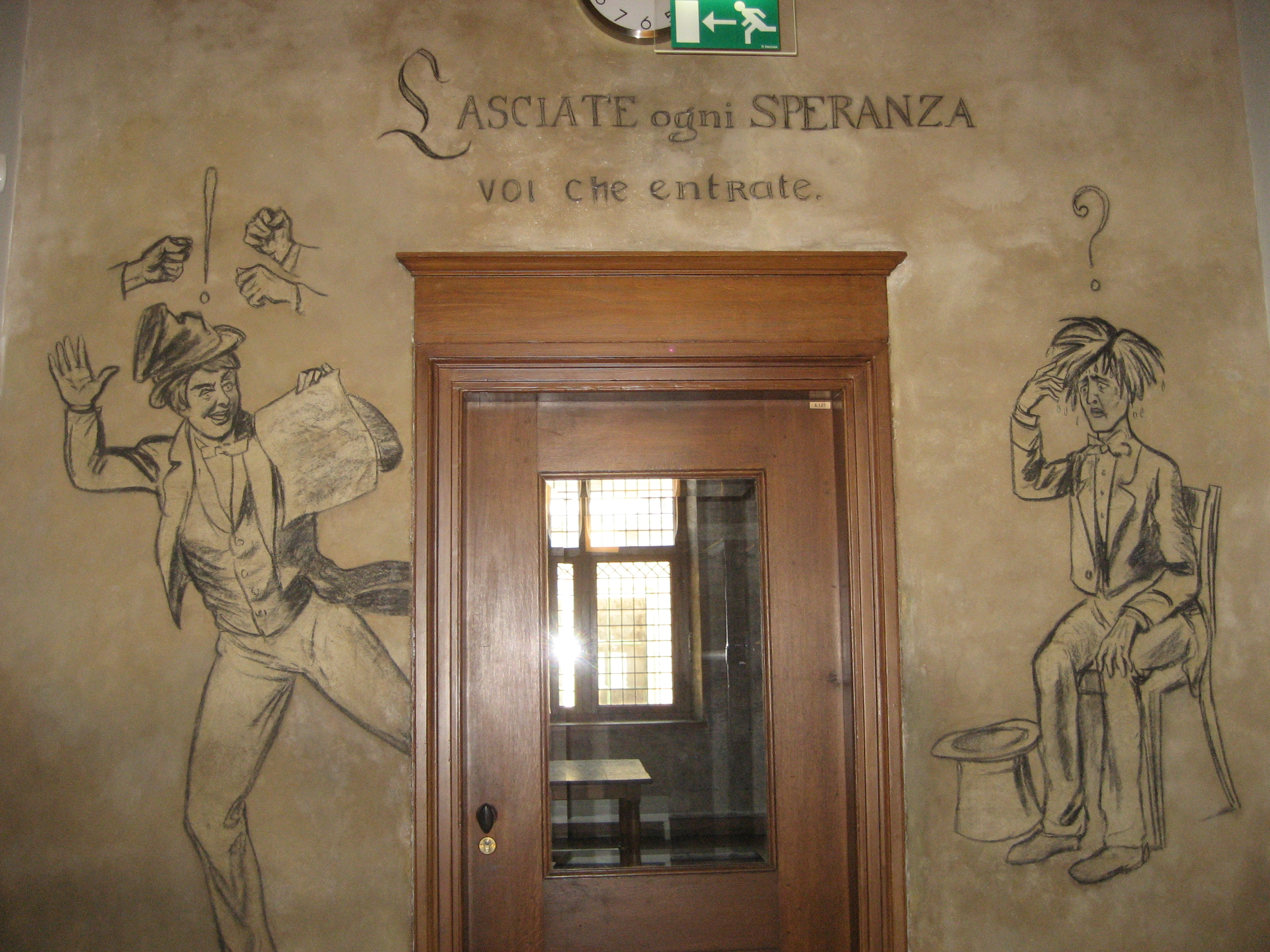 Zweetkamertje, Academiegebouw, Universiteit Leiden (Nederland). Tekening door Victor de Stuers (1843-1916)